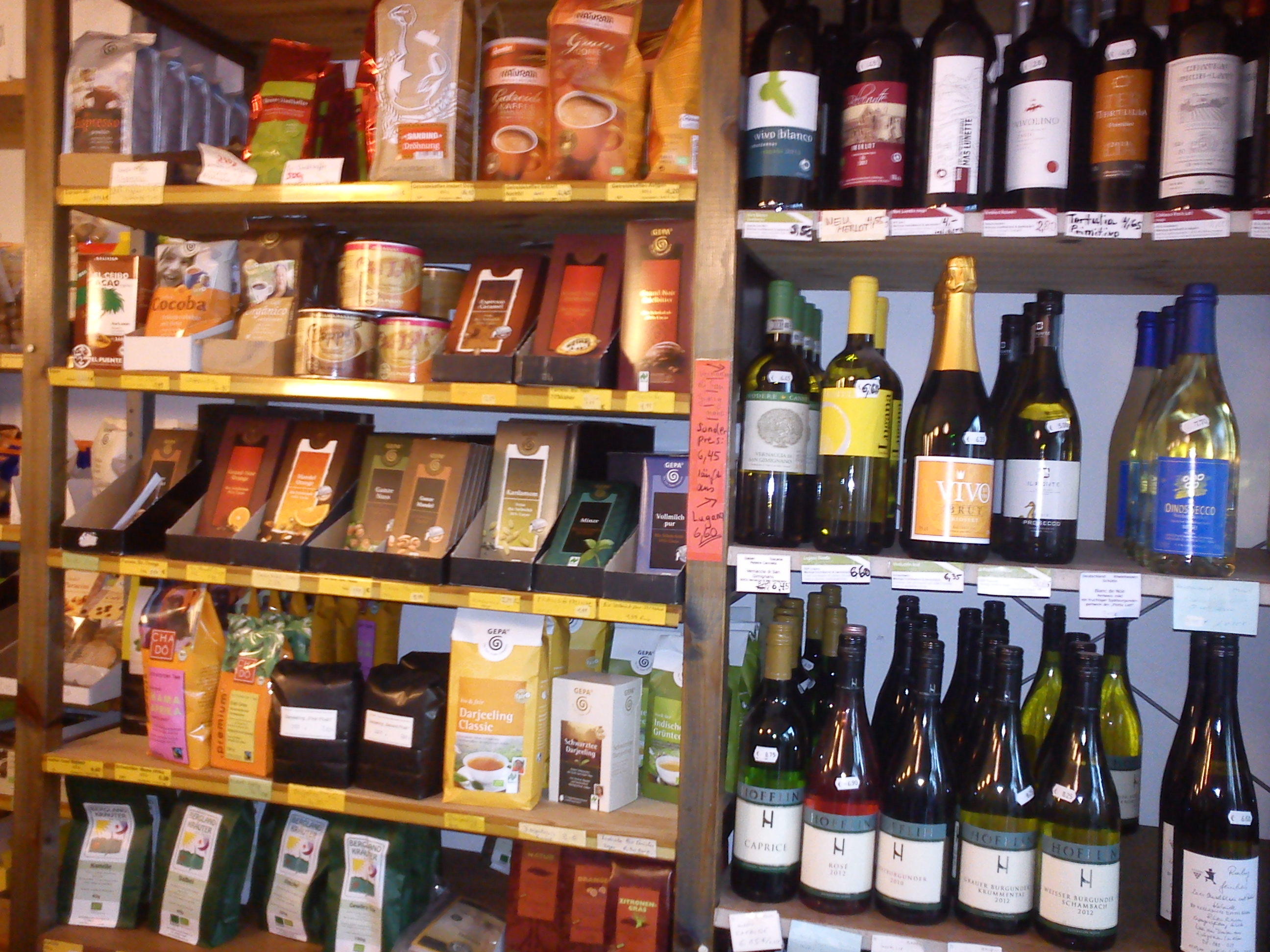 Sortiment im EVG-Laden